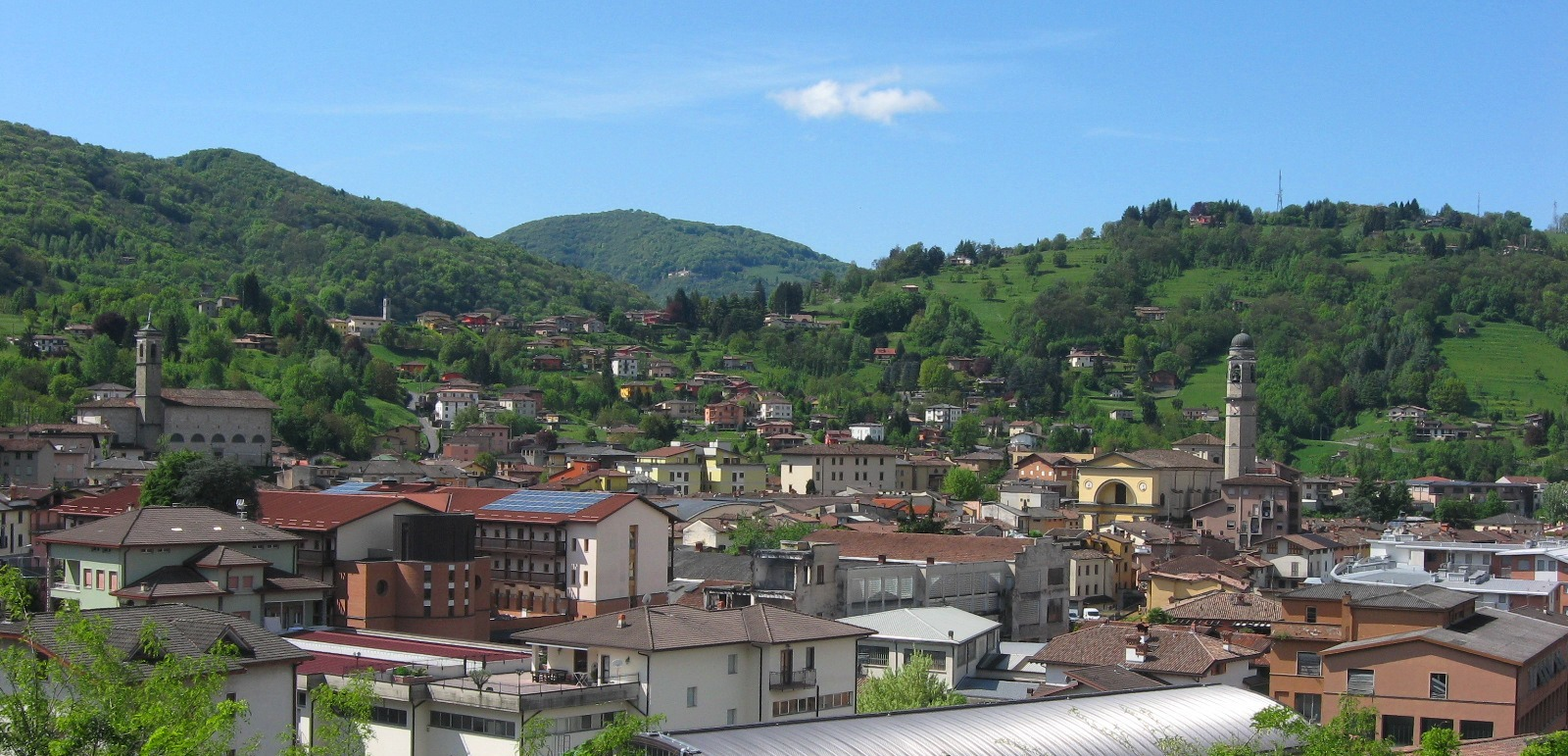 Panorama di Leffe (BG)